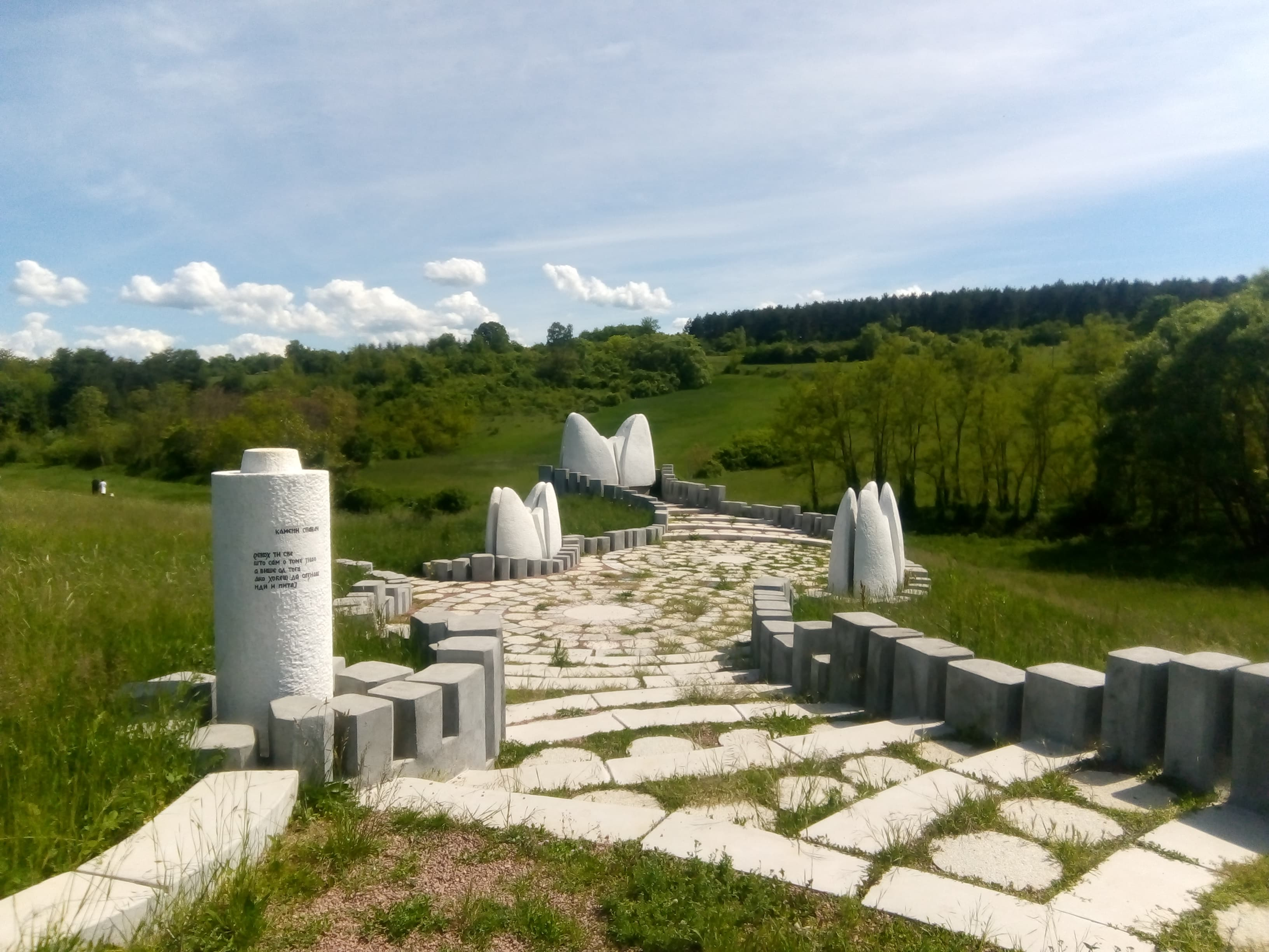 Srpski (latinica): Spomenik "Kameni spavač" u Spomen-parku Kragujevački oktobar